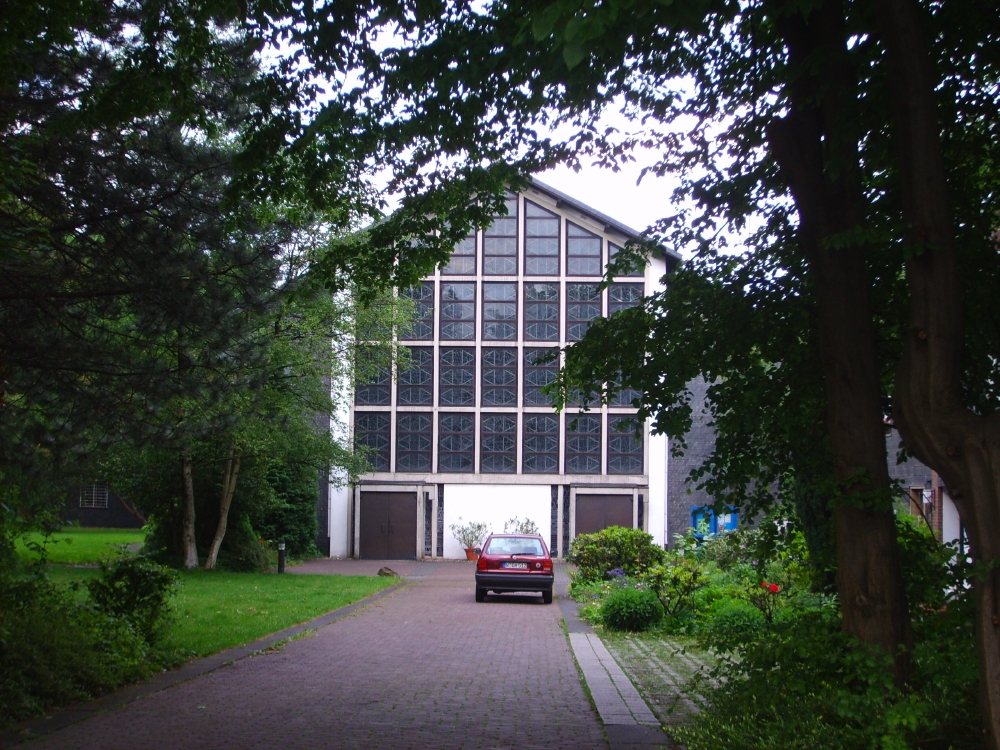 Sankt Bonifatius, Wuppertal, Germany